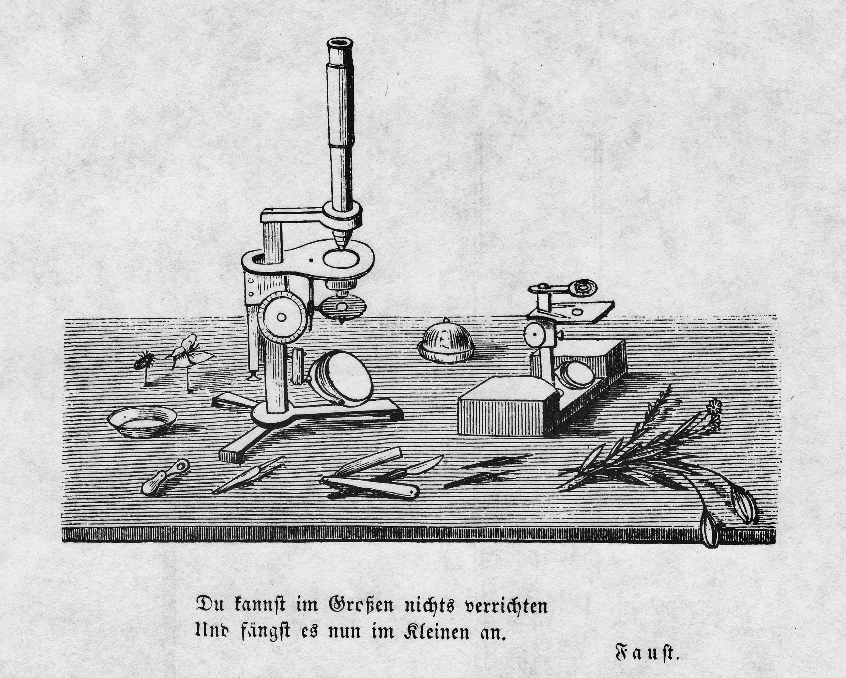 Matthias Jacob Schleiden, 1848